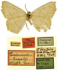 Pionenta ochreata (Hulst, 1898) (syn.: Sabulodes arizonata Taylor, 1905)